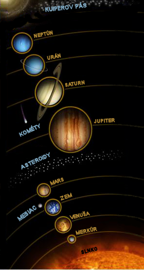 Slnečná sústava z nemeckej wiki + preklad názvov Zdroj: sk::de:Bild:Sonnensystem.jpg Pôvodný zdroj: NASA